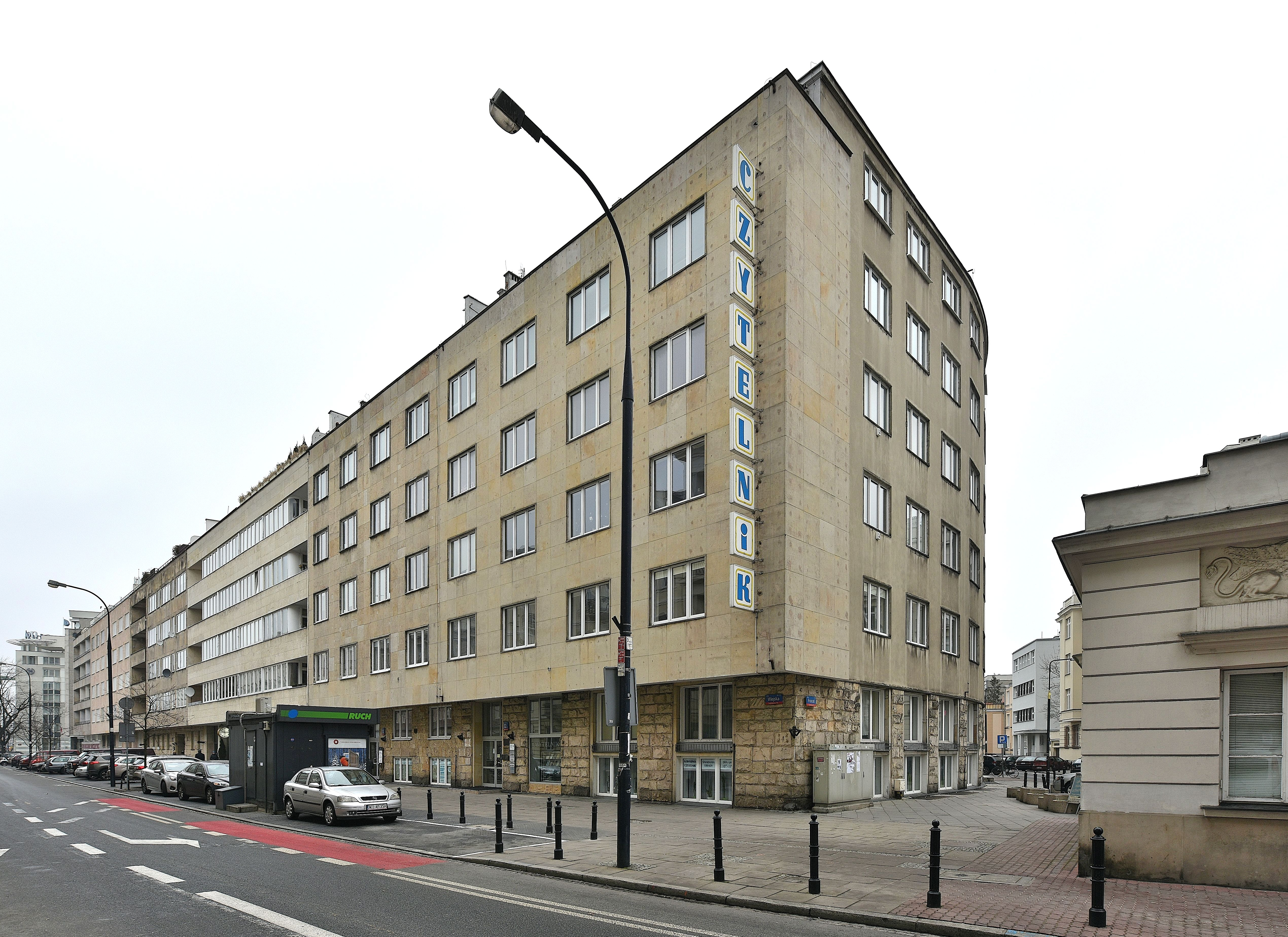 Siedziba Spółdzielni Wydawniczej "Czytelnik" oraz m.in. Biura Krajowego Platformy Obywatelskiej przy ul. Wiejskiej 12a w Warszawie